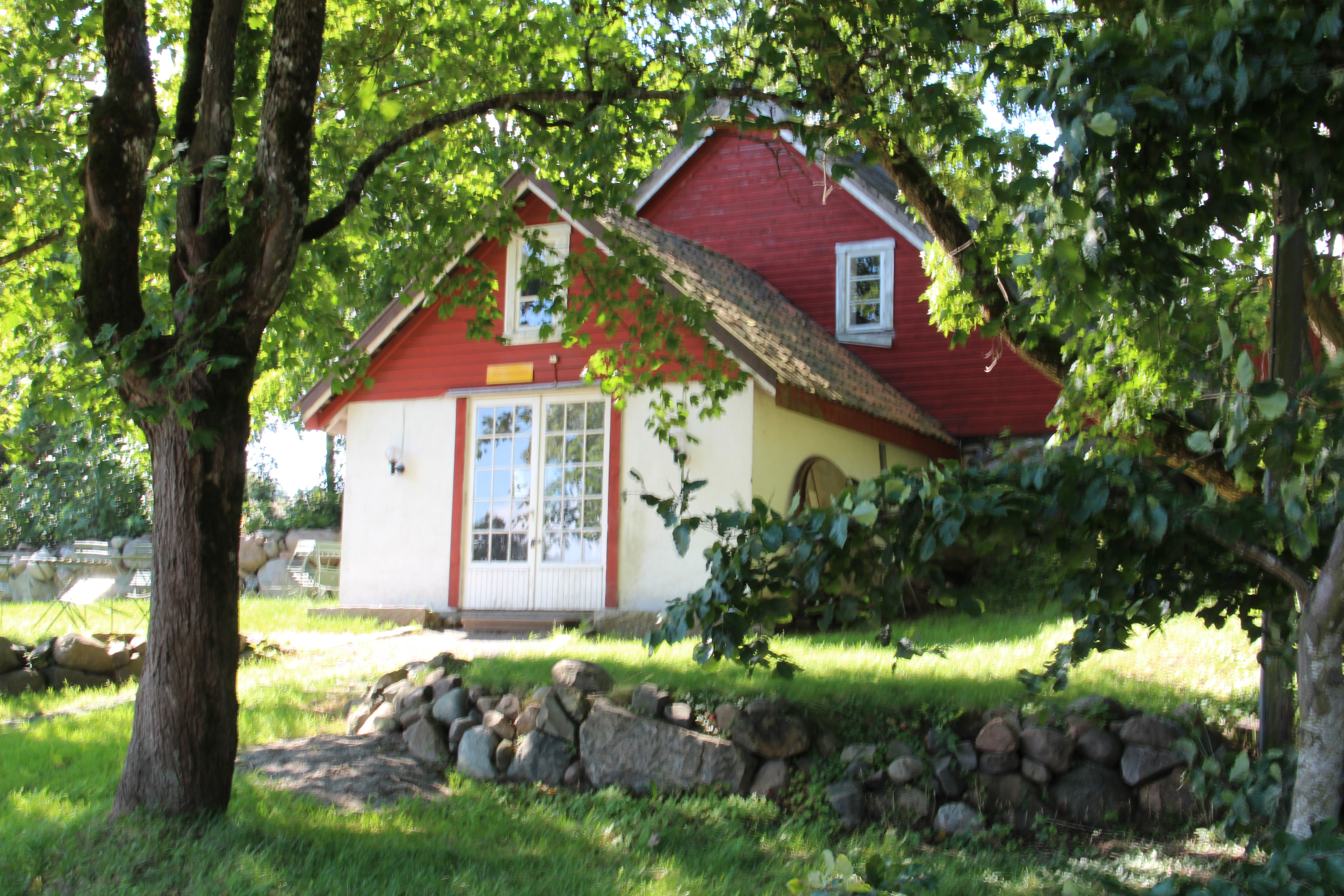 Potetkjelleren